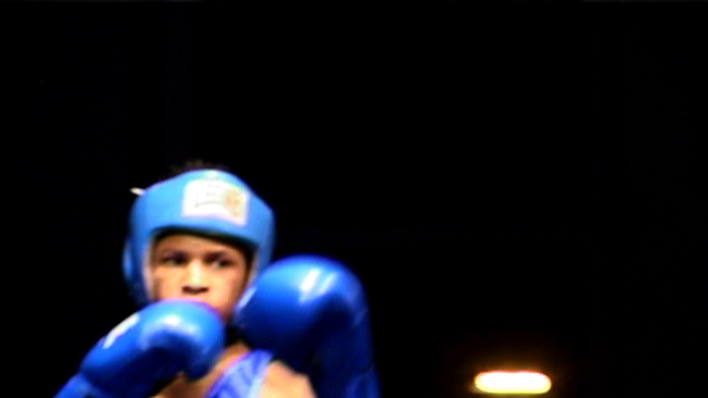 Image tirée de « Collection Premier Jour » de Fernand Melgar.